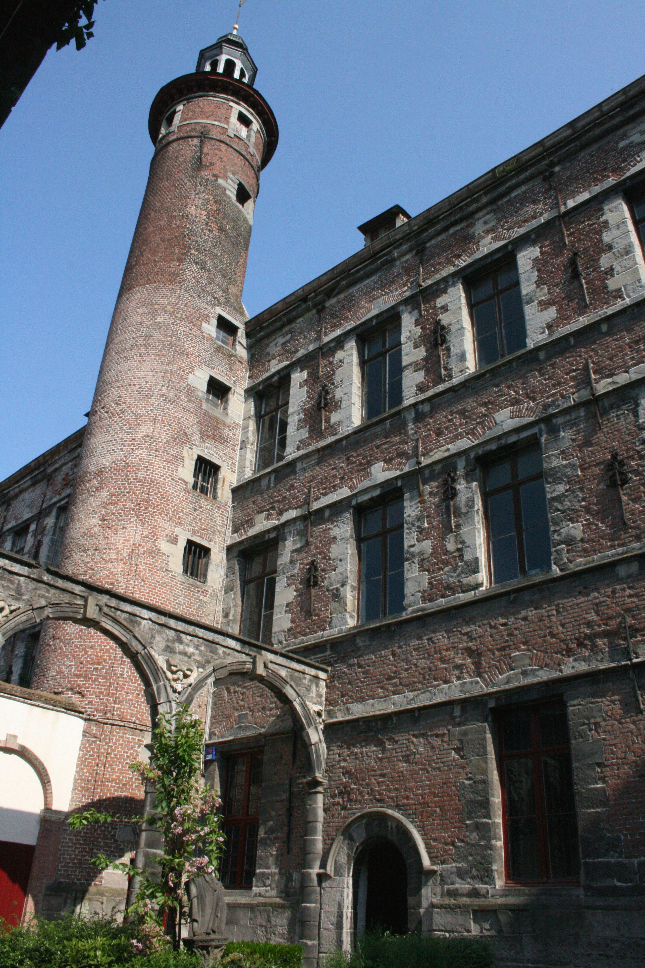 Rue des Carmes 8, Tournai, Hainaut, Belgique. Musée d'archéologie. Ancien Mont-de-Piété